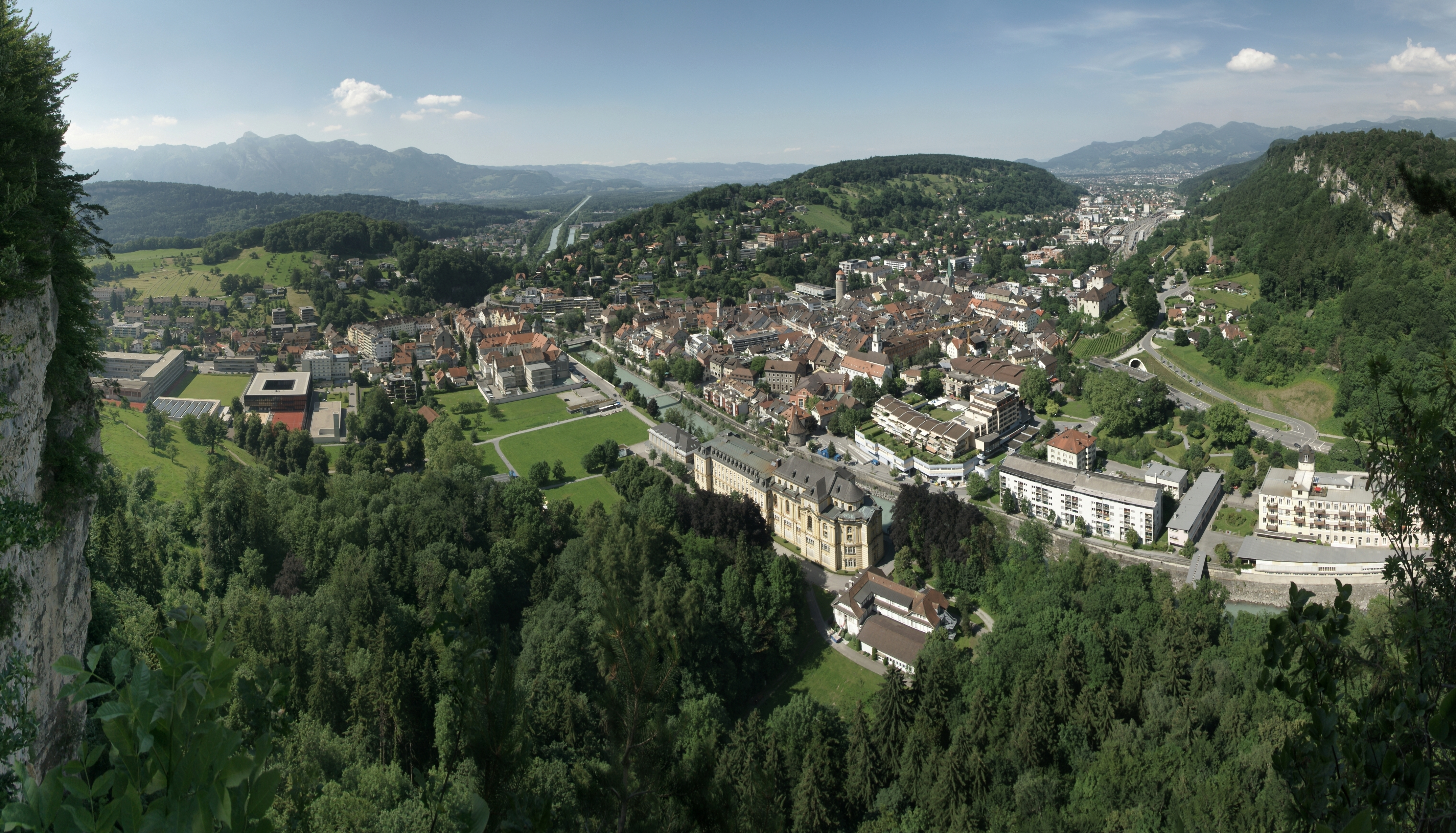 Feldkirch Stadt. Ein Panorama vom Stadtschrofen in Frastanz, Maria Grün.